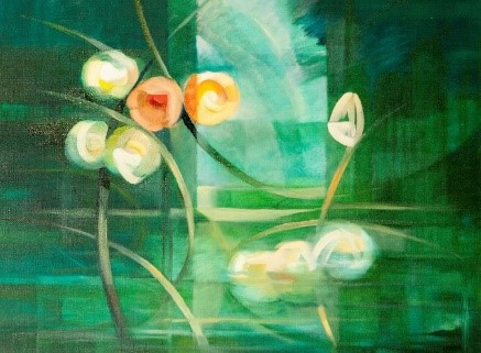 NEMZEDÉKEK (60x80 cm, olaj, vászon) A témát – egyidőben élő három nemzedéket csodálatos finom színekkel és formákkal (virág motívumokkal fejezik ki). A kép jobb oldalán egyenes szárral, a feltörekvő nemzedék – a gyermek – mint a folyamatosság garanciája emelkedik ki. Baloldalon a fiatalok, vagy már középkorúak együvé tartozása és a vidám, finom színek, a tettekben gazdag meghatározó szerepre utalnak. Alul az idős, már-már távozni készülő nemzedék visszafogott színekkel az elmúlást jelzi.